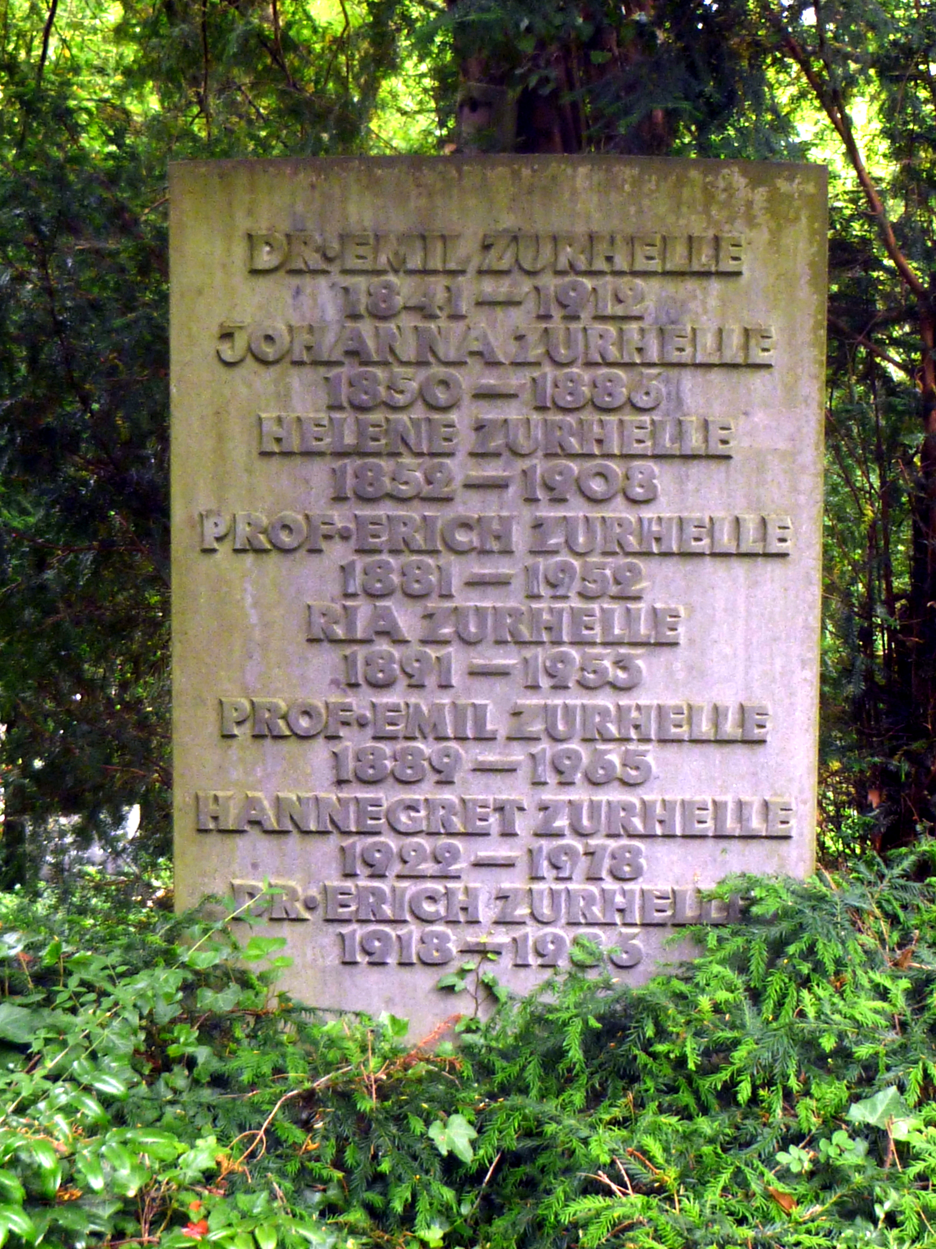 Grabstein der Grabstätte Familie Zurhelle, Aachen Heißbergfriedhof Burtscheid